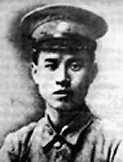 Jiang Xianyun